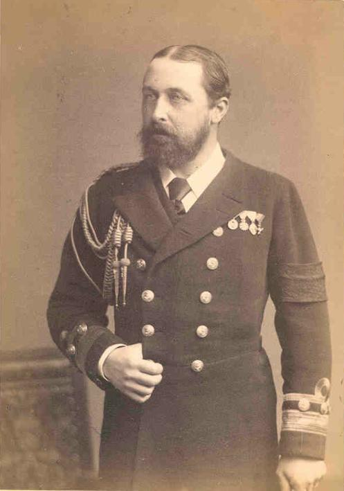 Alfred d'Edimbourg, fils de la reine Victoria